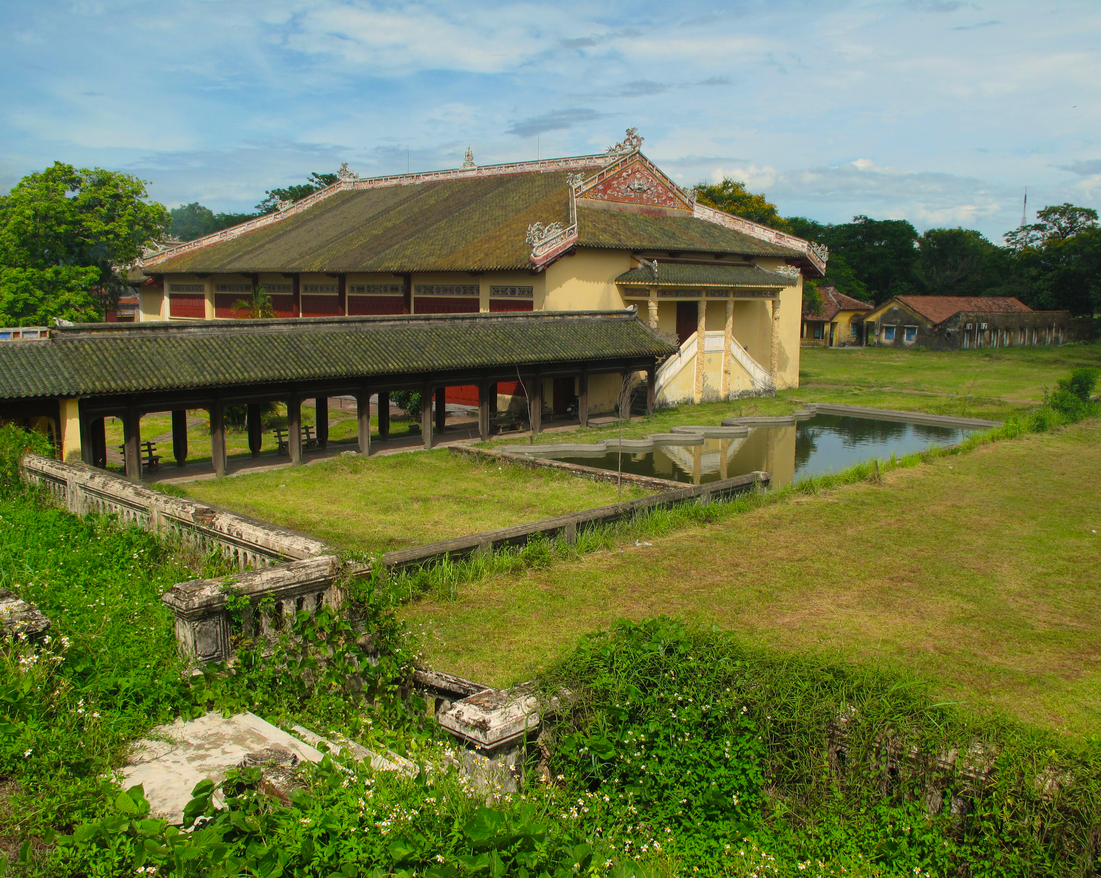 Duyệt Thị Đường (Duyệt: xem xét để phân biệt điều phải trái; Thị: xem; Đường: ngôi nhà) là một nhà hát dành cho vua, hoàng thân quốc thích, các quan đại thần và là nơi biểu diễn các vở tuồng dành cho quan khách, sứ thần thưởng thức. Tuồng biểu diễn trong Duyệt Thị Đường là các vở tuồng cung đình. Đây được xem là nhà hát cổ nhất của ngành sân khấu Việt Nam.